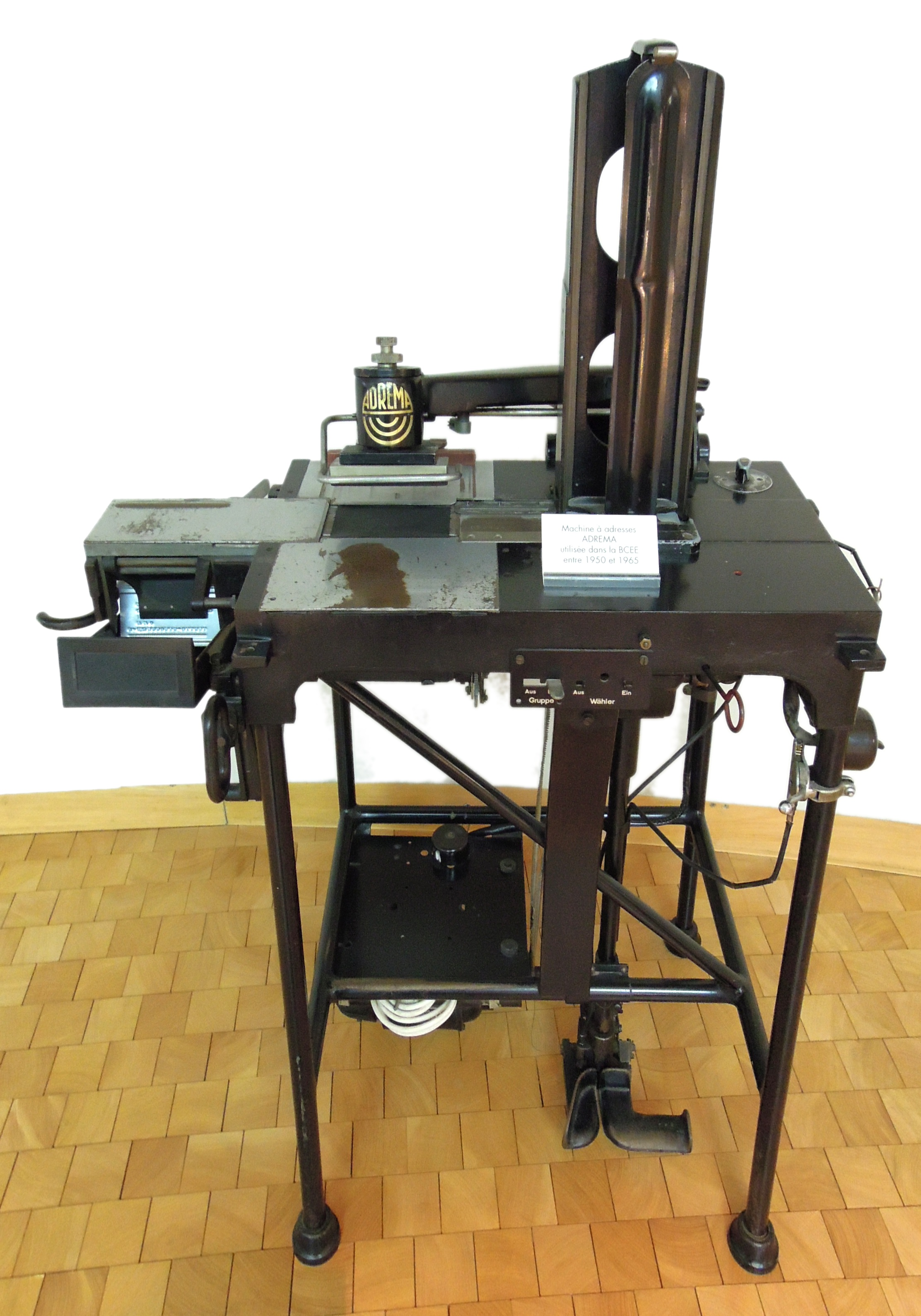 Adressiermaschine